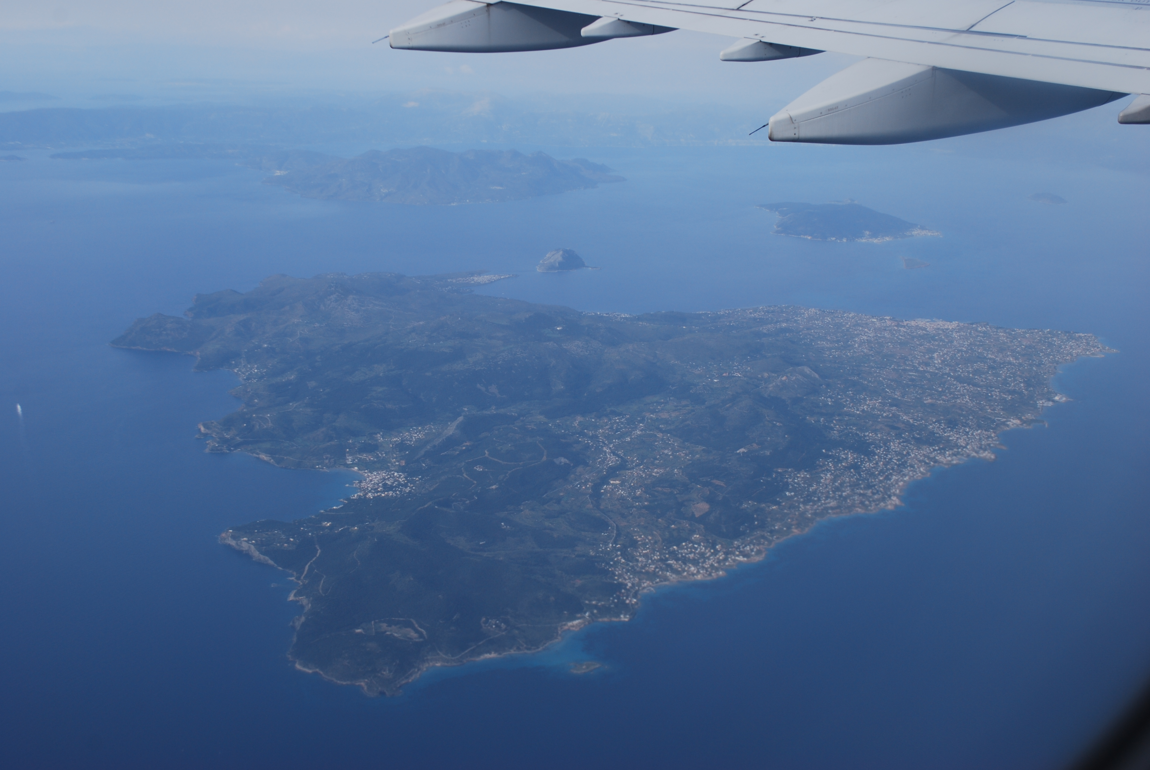 Vue de l'aéroport international d'Athènes.